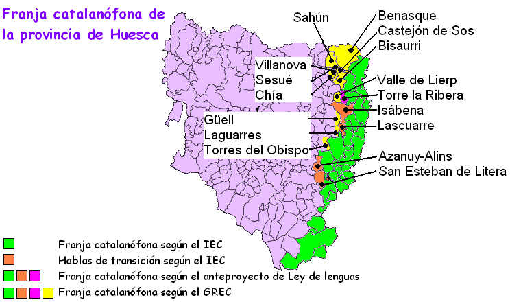 Mapa de los municipios catalanohablantes de la provincia de Huesca (España)